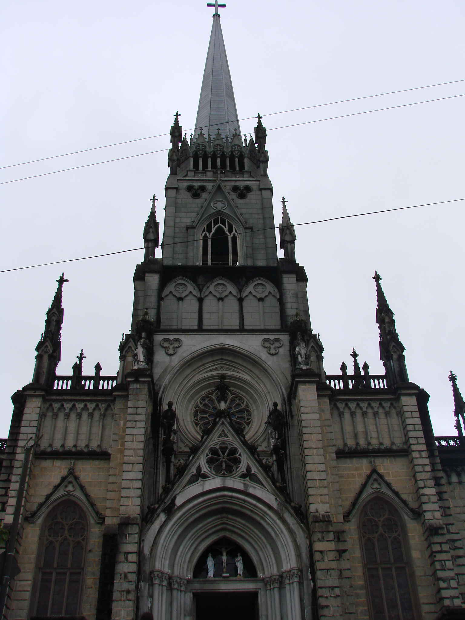 A maior catedral da cidade de Petrópolis - onde está enterrado D. Pedro II.